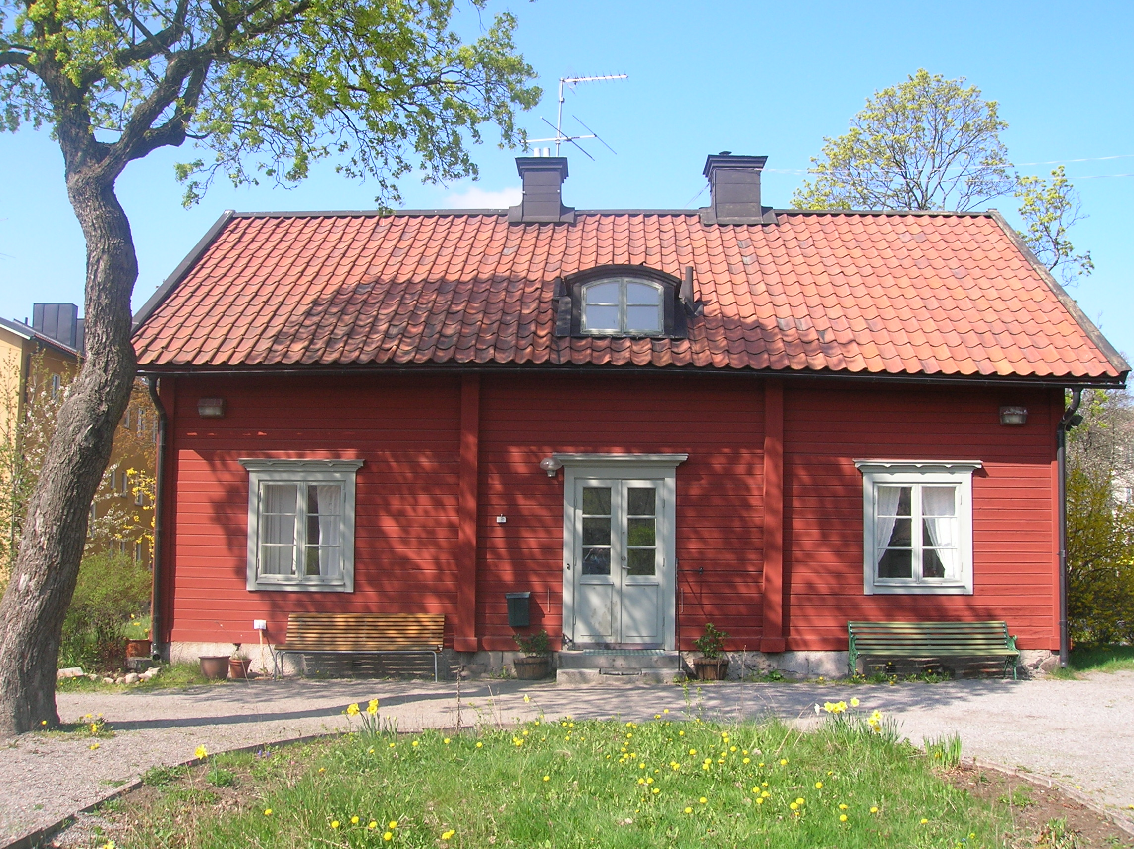 Torpet Hökmossen i Västberga, uppfört 1784.